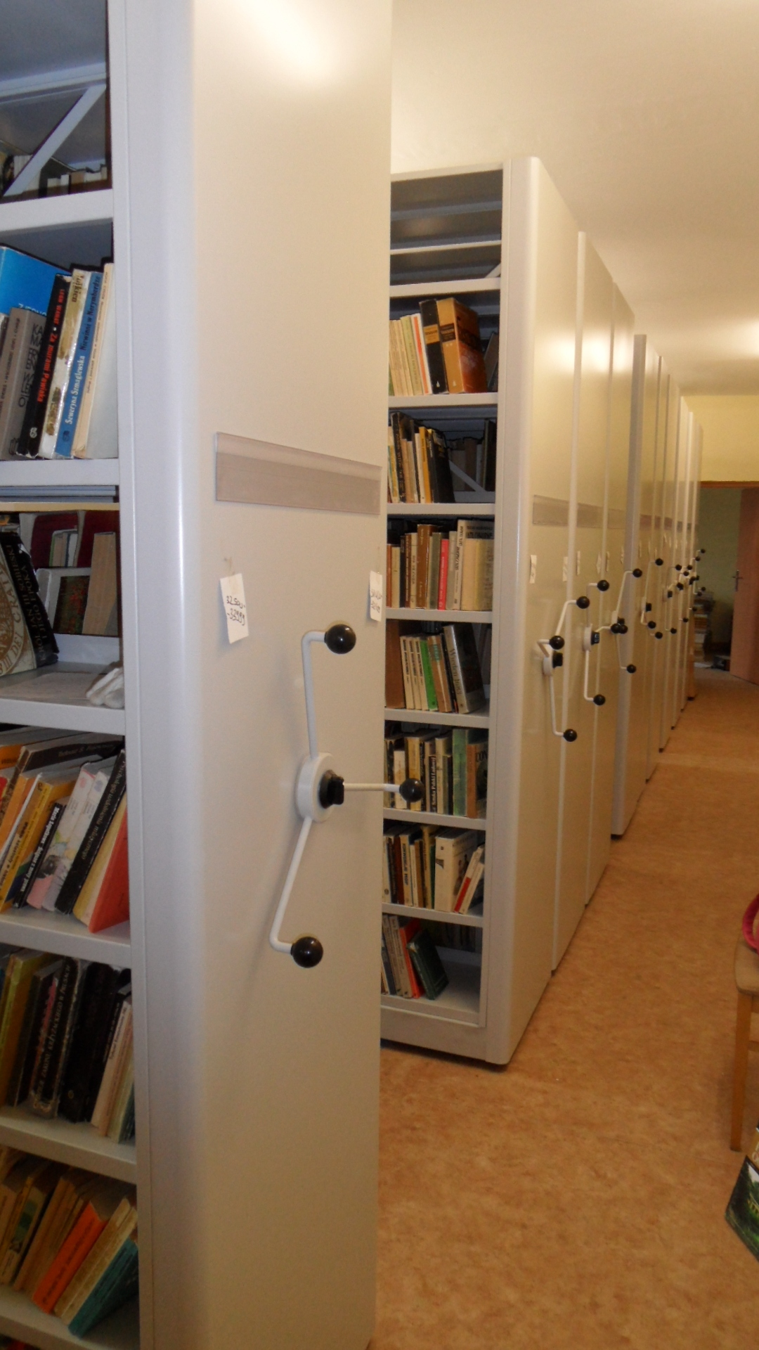 Nowe regały przesówne, Biblioteki Pedagogicznej w Trzebnic